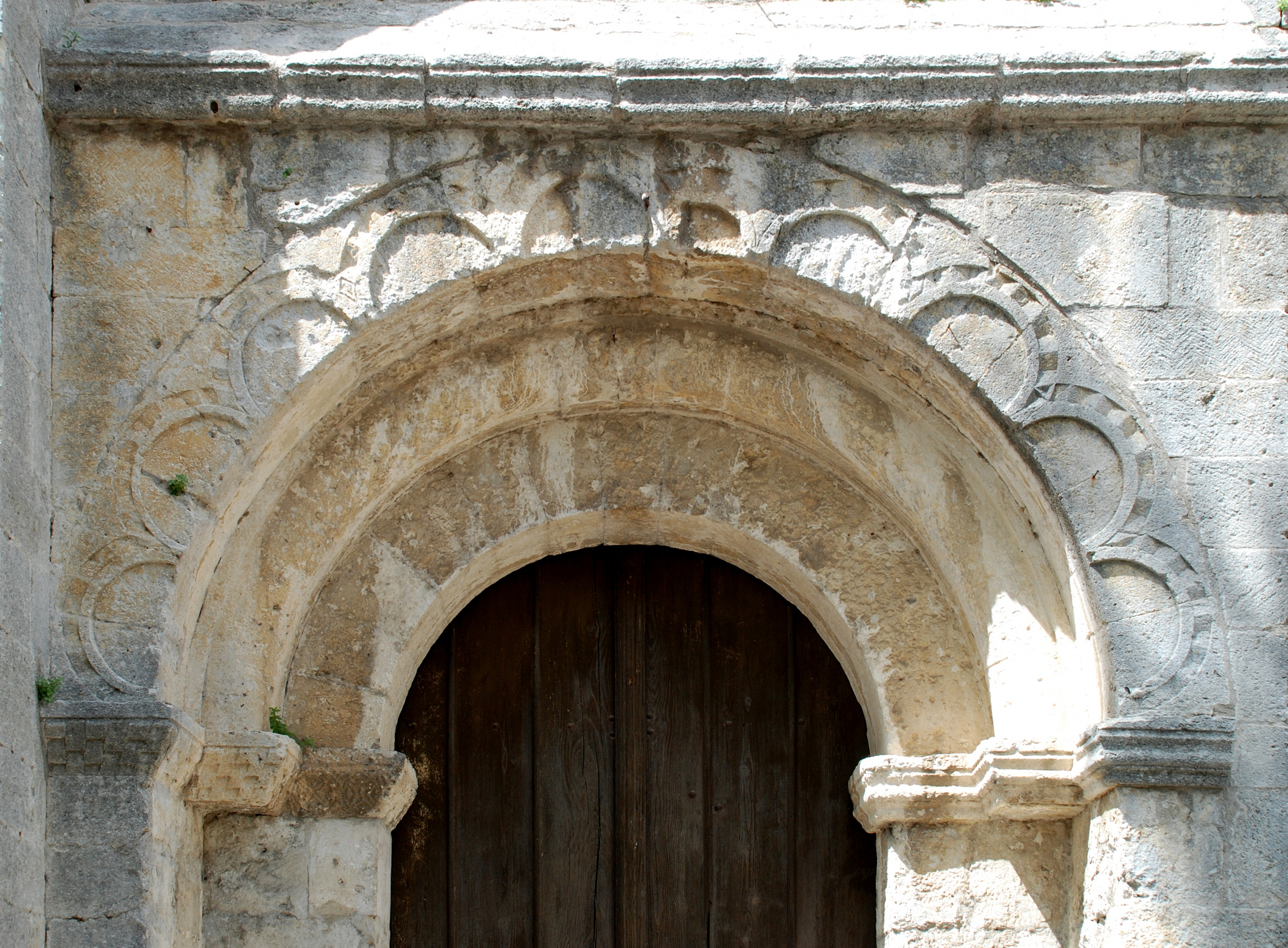 France - Provence - Boulbon - Saint-Marcellin